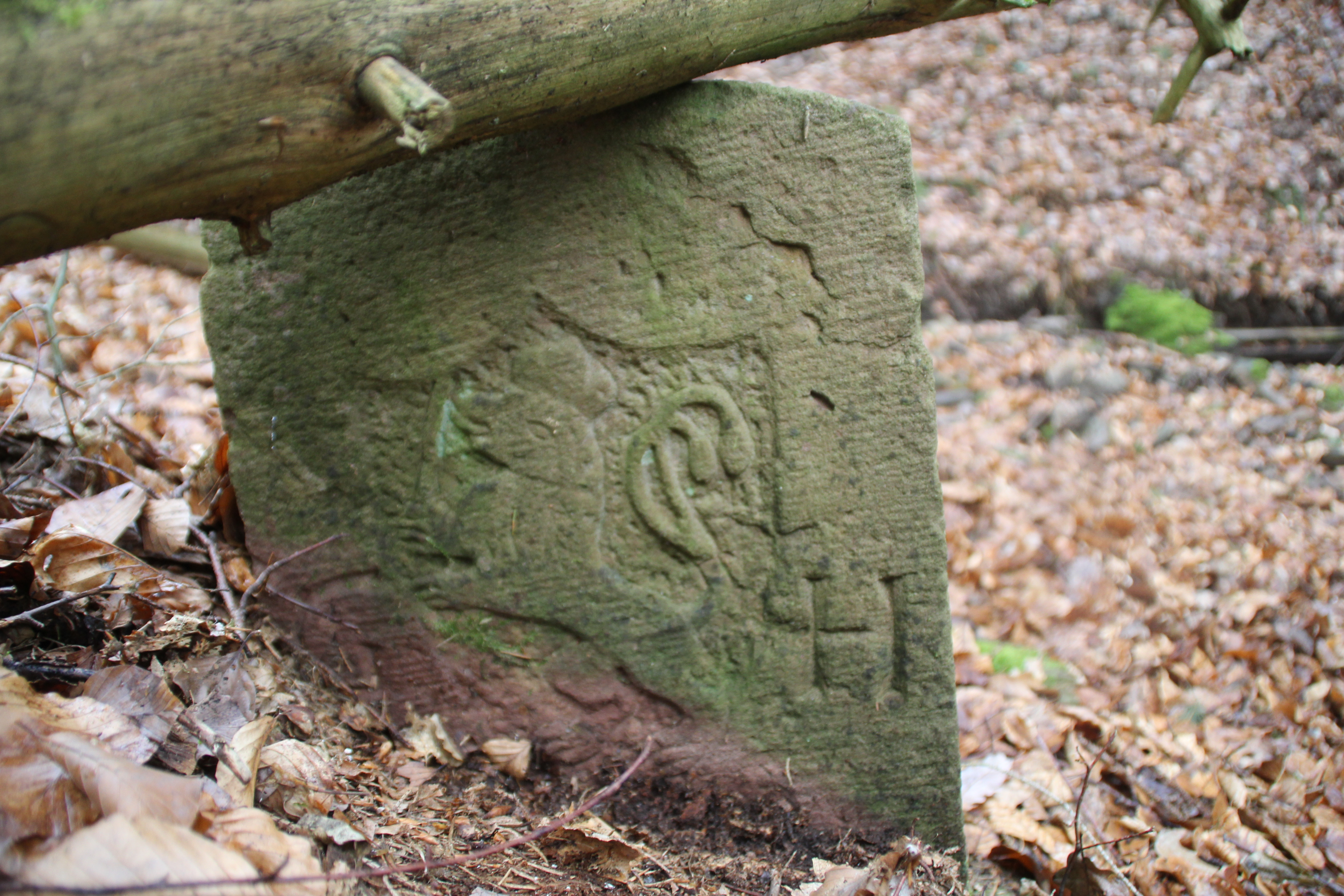 Grenzstein zwischen Oberwestern und Hofstädten